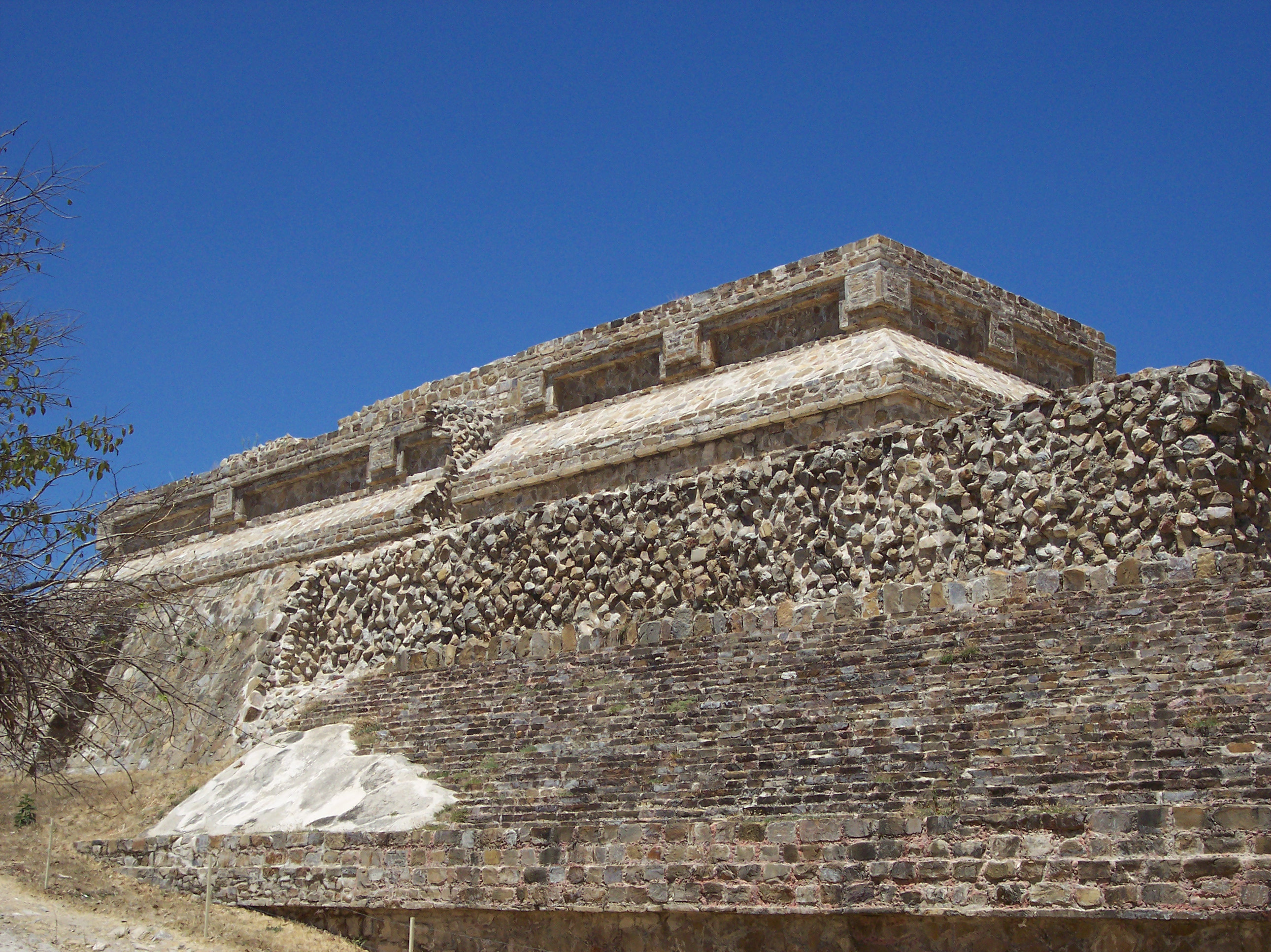 Photo taken in Monte Alban, State of Oaxaca, Mexico. NOTE: Photo nead to be describe. SPANISH: Foto tomada en Monte Albán, Estado de Oaxaca, México.